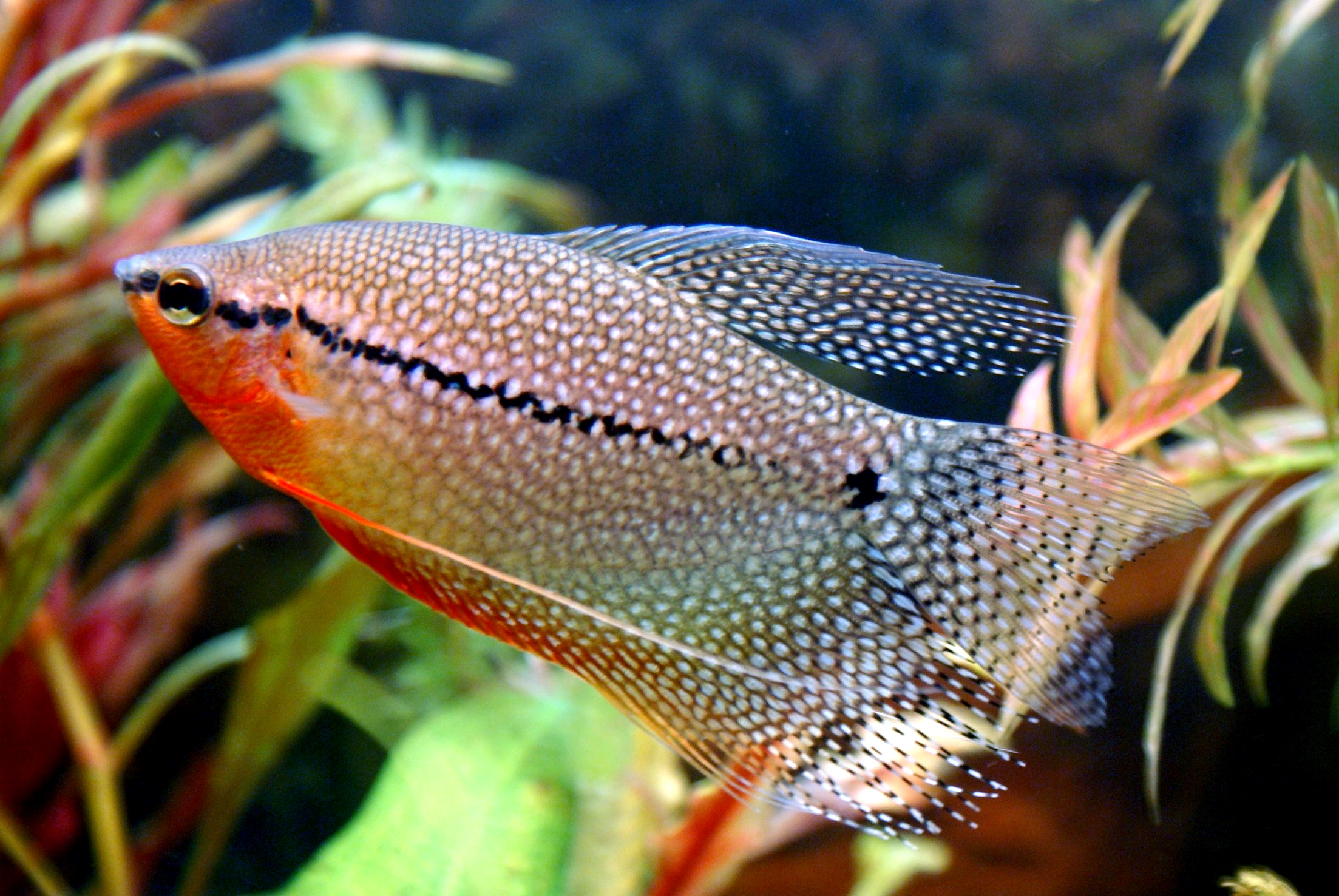 Trichgaster leerii